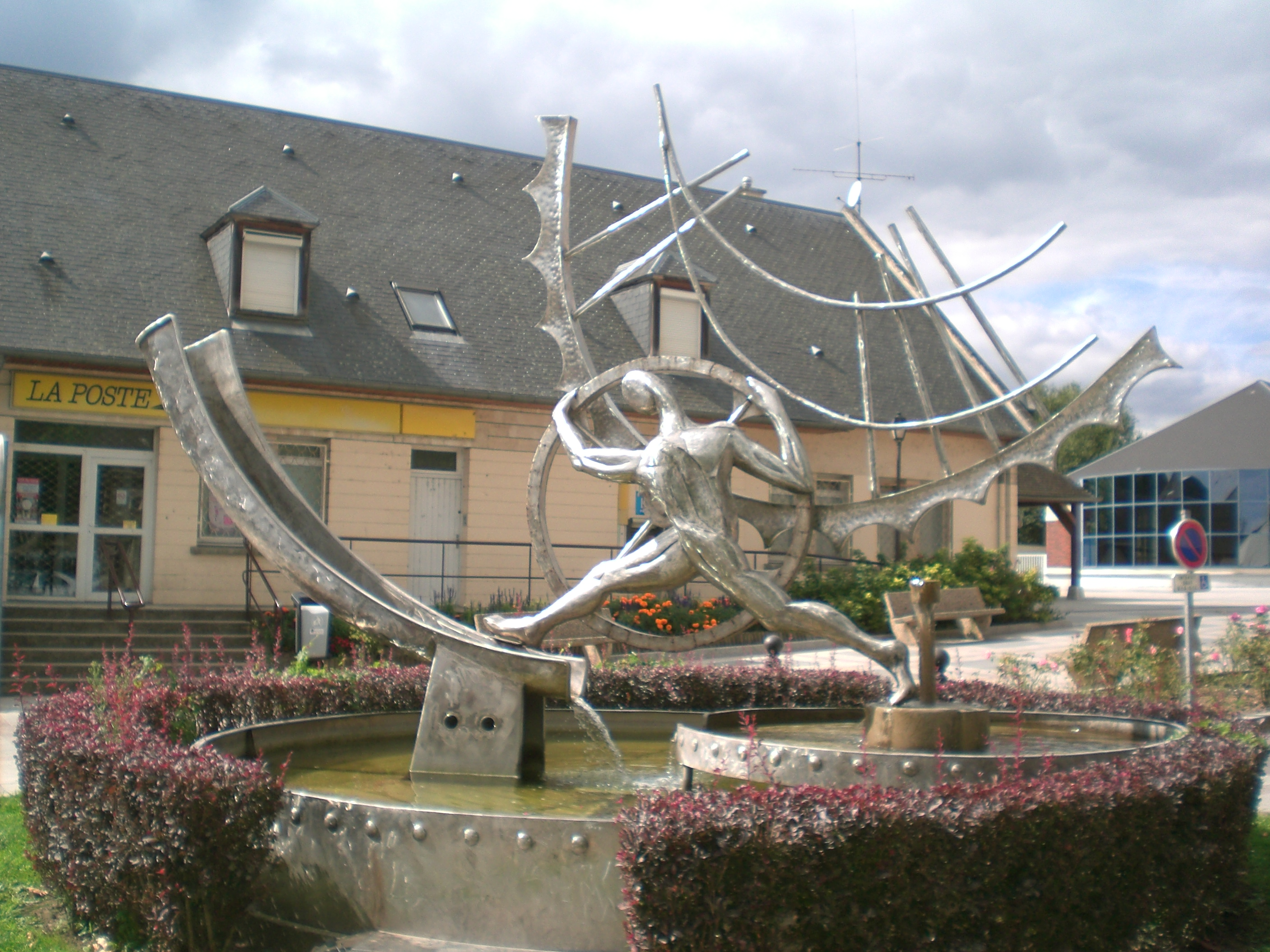 fontaine devant la mairie de bornel oise france